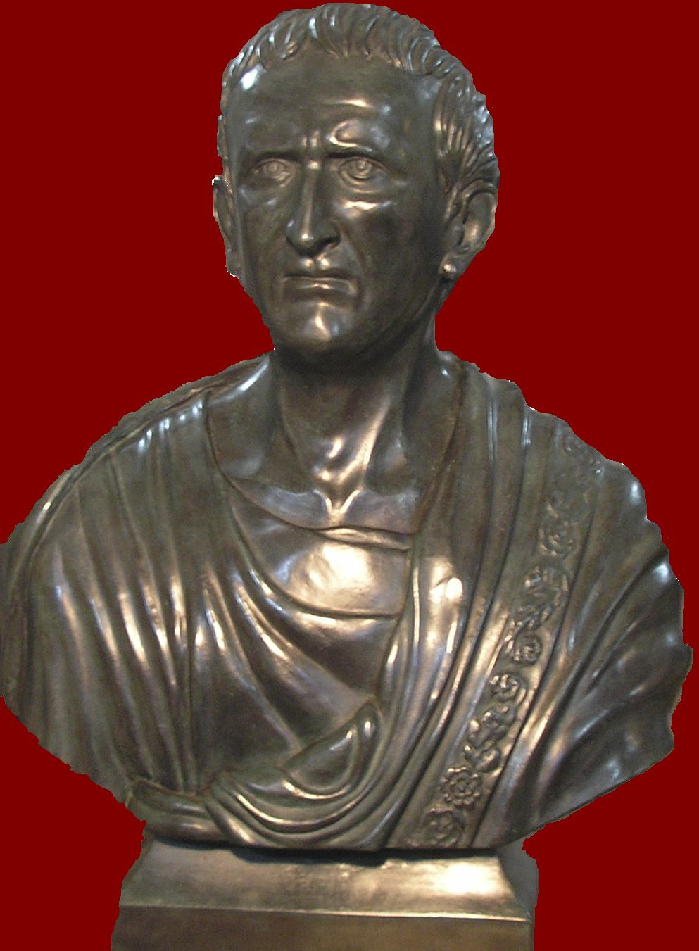 Busto di Cocceio Nerva nella città di Narni